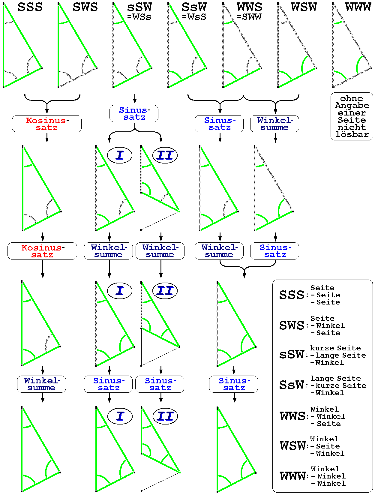 Übersicht über die Abfolge der einzelnen Rechenschritte bei der Berechnung eines beliebigen Dreiecks